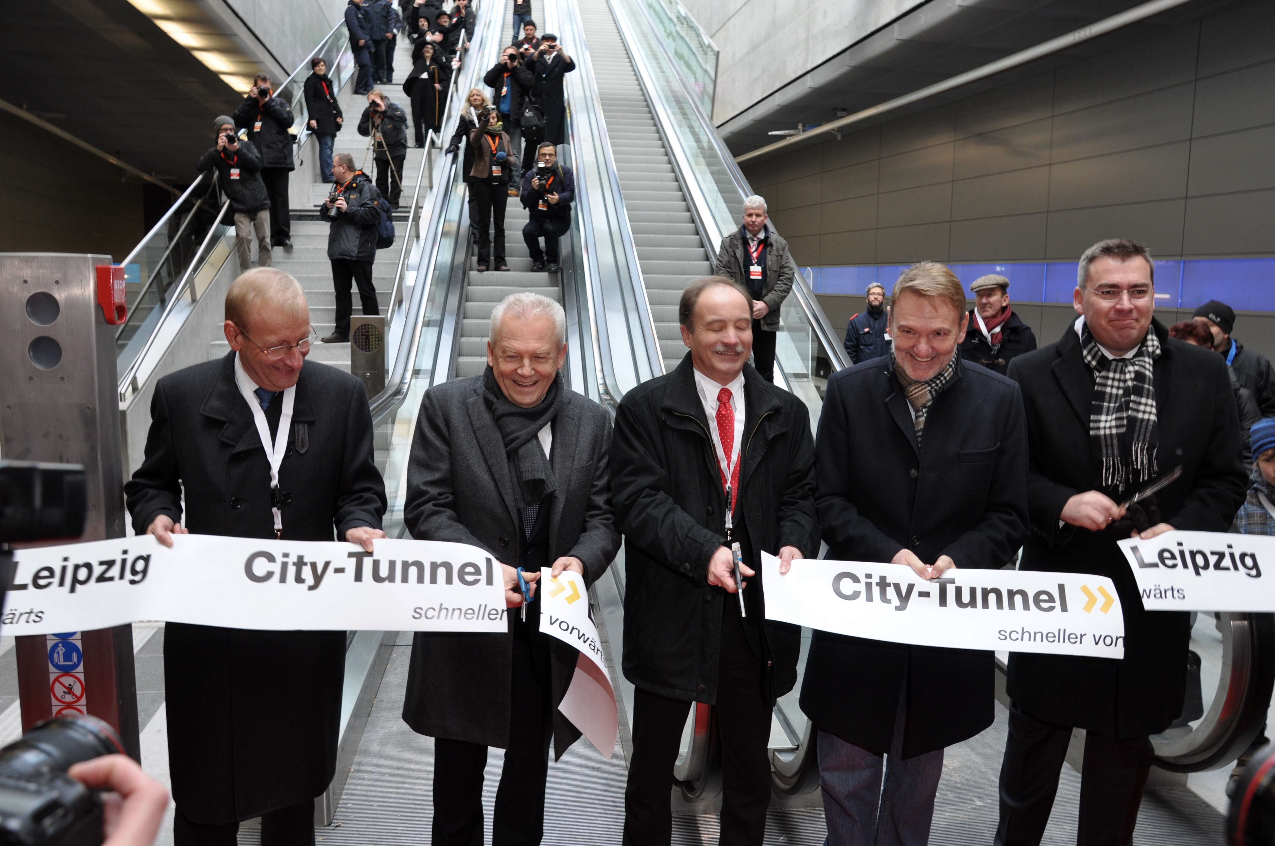 Symbolisches Zerschneiden des Eröffnungsbandes der Station Bayerischer Bahnhof im City-Tunnel Leipzig; abgebildet sind von links nach rechts Artur Stempel (Konzernbevollmächtigter der Deutschen Bahn AG für den Freistaat Sachsen), Dr. Rüdiger Grube (Vorstandvorsitzender der Deutschen Bahn AG), Sven Morlok (Sächsischer Staatsminister für Wirtschaft, Arbeit und Verkehr), Dr. Volker Kefer (Vorstand Infrastruktur der Deutschen Bahn AG) und Jan Mücke (Parlamentarischer Staatssekretär beim Bundesminister für Verkehr, Bau und Stadtentwicklung).